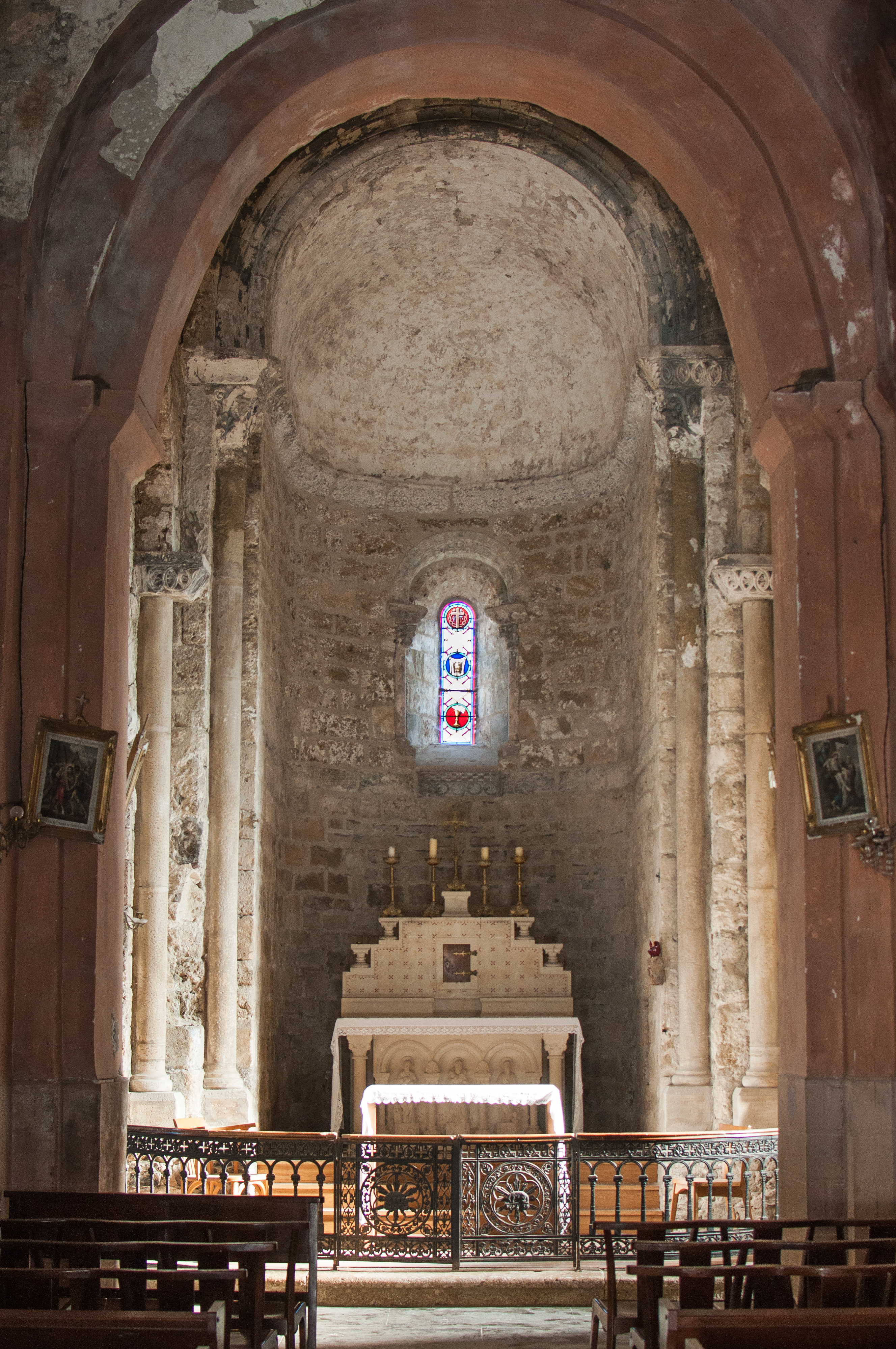 choeur de l'église d'Axiat (09)